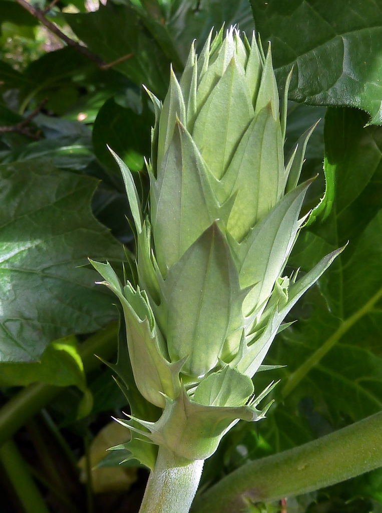 Acanthus mollis (Acanto) : Espiga floral en pre-antesis - Cultivado/ornamental, avenida de Bruselas, Madrid (España).